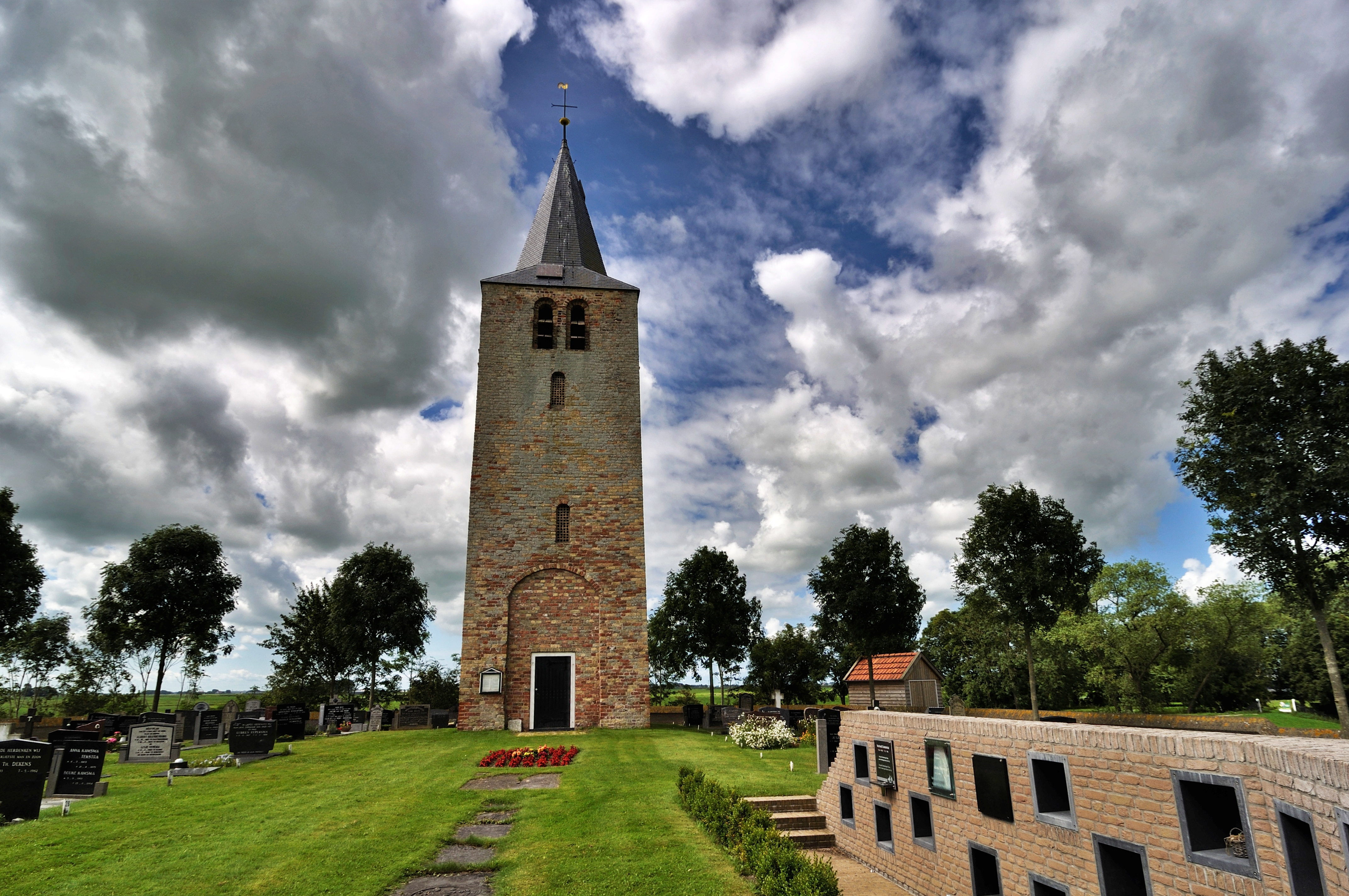 Dagje in friesland, dit kerkje in Tsjerkebuorren (Friesland) op de foto gezet. Ik reed er met de auto voorbij, en vond het bijzonder mooi